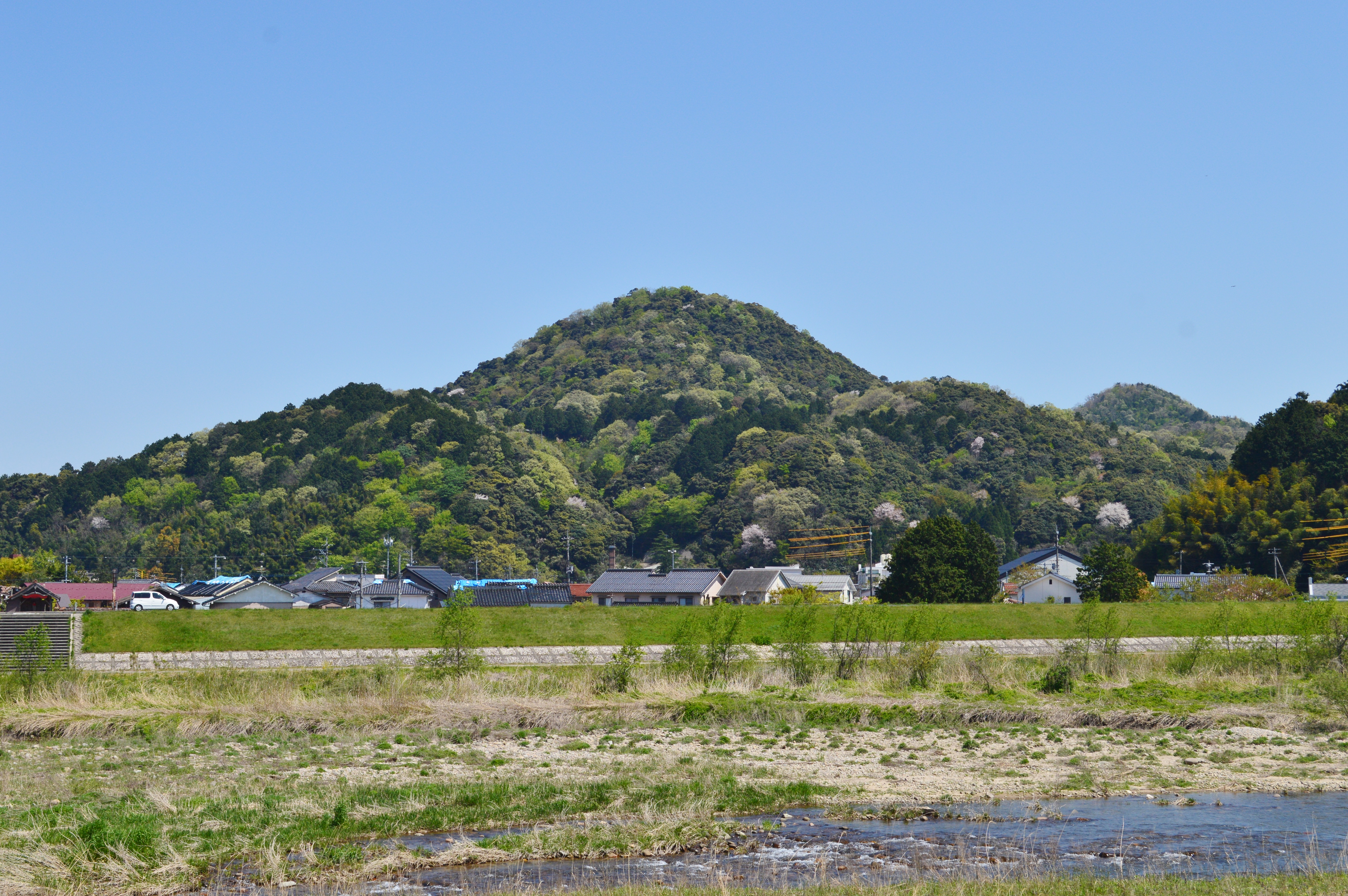 打吹城 全景